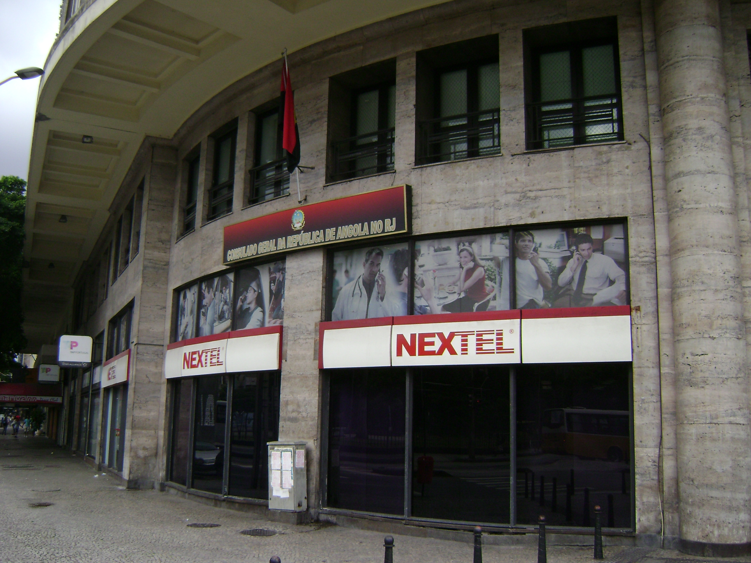 Entrada do consulado da Angola ao lado de lojas da Nextel na cidade do Rio de Janeiro.